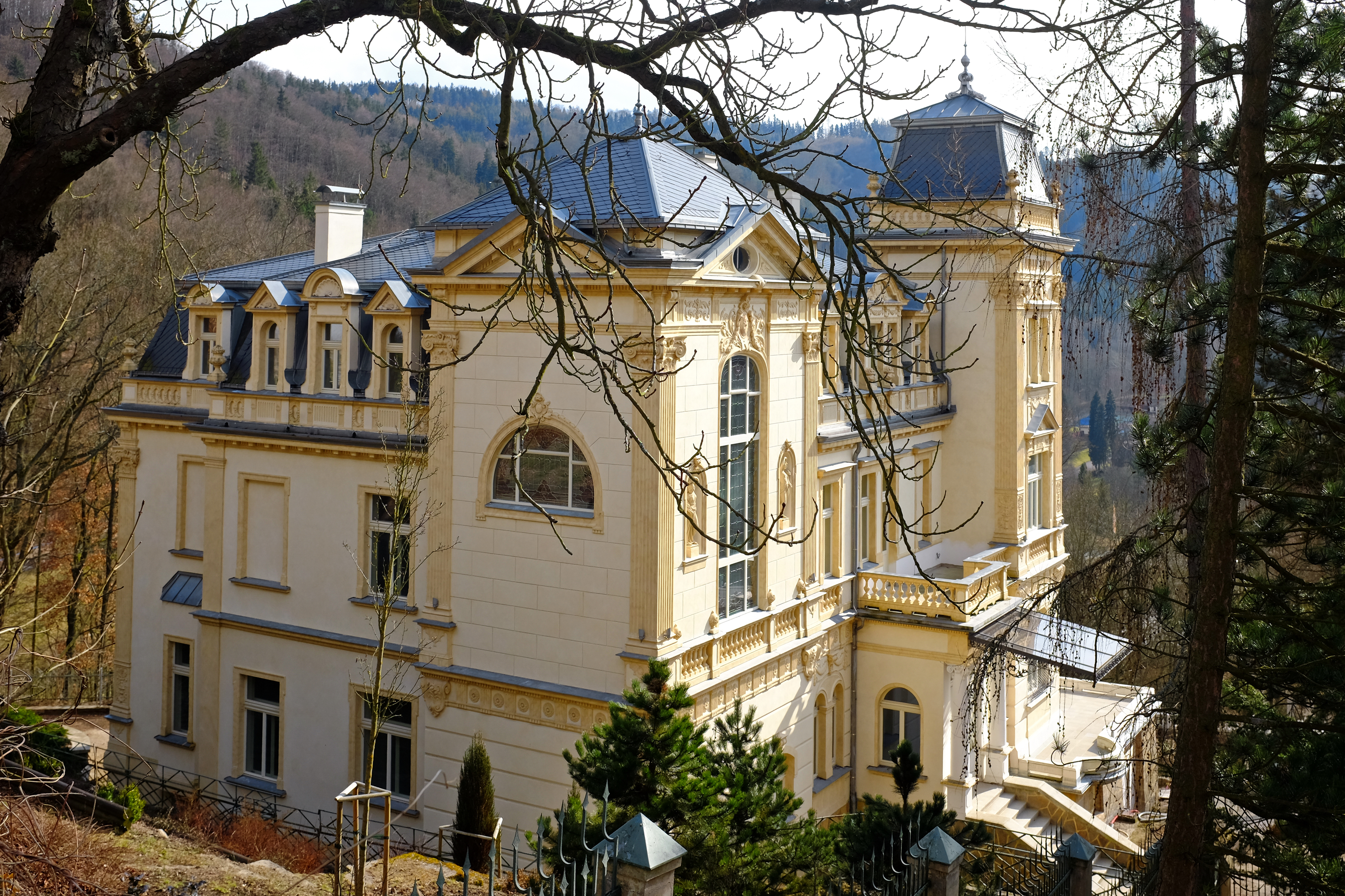 Vila Pupp, Jarní 1235/6, Karlovy Vary.